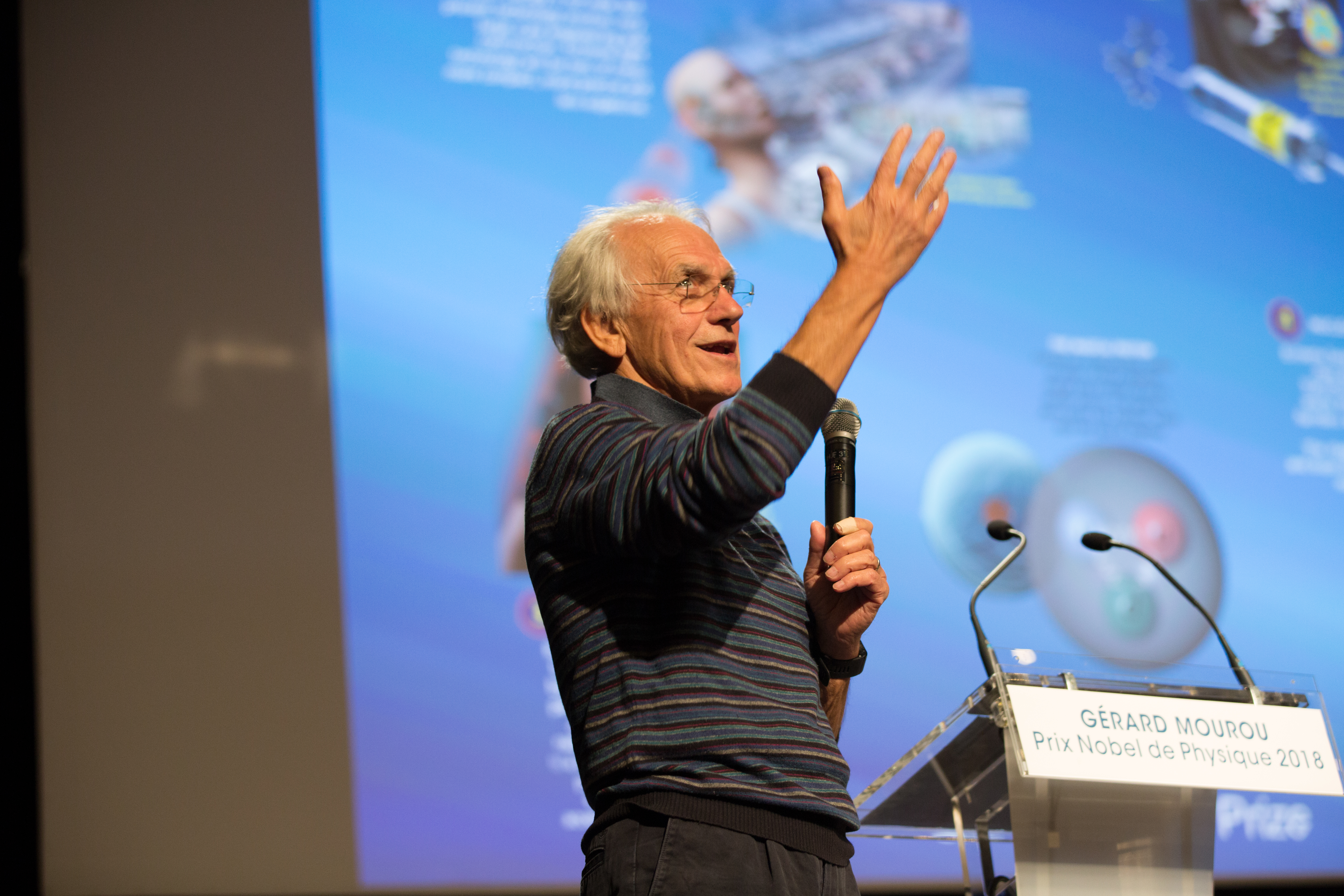 Gérard Mourou, professeur et membre du Haut-collège de l'École polytechnique a été nommé prix Nobel de physique 2018. Il partage cette récompense avec la canadienne Donna Strickland pour avoir conjointement élaboré une méthode de génération d'impulsions optiques ultra-courtes de haute intensité. Arthur Ashkin reçoit aussi le prix pour l'invention des pinces optiques. Les applications dans le domaine médical en particulier des deux techniques sont soulignées par l'Académie Nobel. Crédit photographique : © École polytechnique - J.Barande